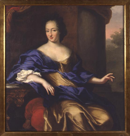 Bildbeschreibung: Ulrike Eleonore von Dänemark, Königin von Schweden